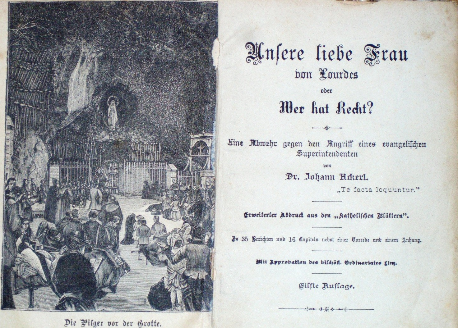 Johann Ackerl: Unsere liebe Frau von Lourdes oder Wer hat Recht. Eine Abwehr gegen den Angriff eines evangelischen Superintendenten, Titelseite der 11. Auflage, Linz 1893. Der Superintendent war Jakob Ernst Koch (1836-1907).